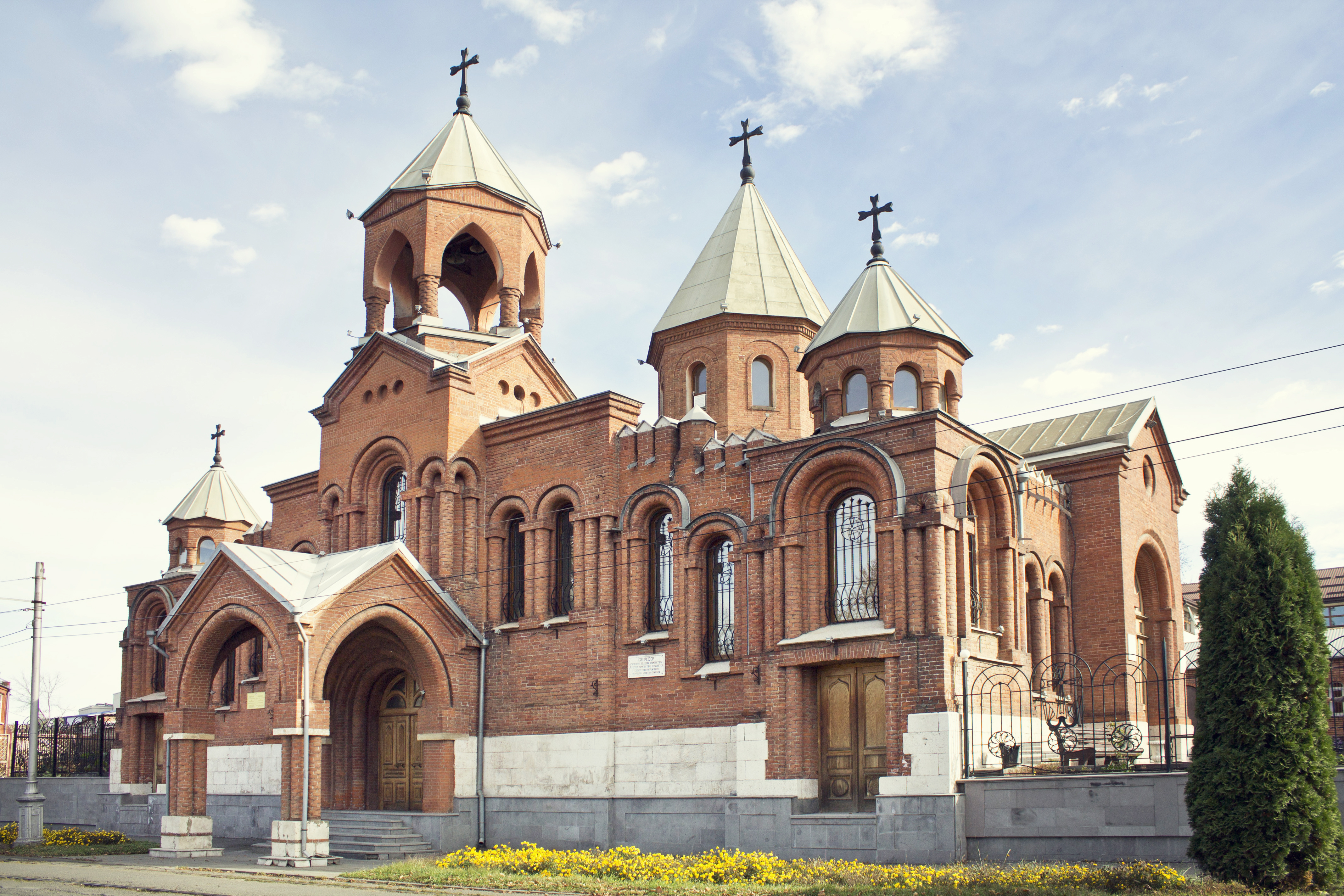 Церковь армянская (григорианская) (Республика Северная Осетия-Алания, Владикавказ, Баева Чермена улица, 15, Армянская улица, 1)